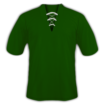 Camiseta de fútbol del Club Ferro Carril Oeste durante 1914